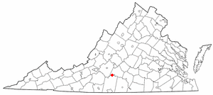 va maps